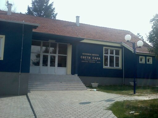 Osnovna škola „Sveti Sava“ u Brzanu.